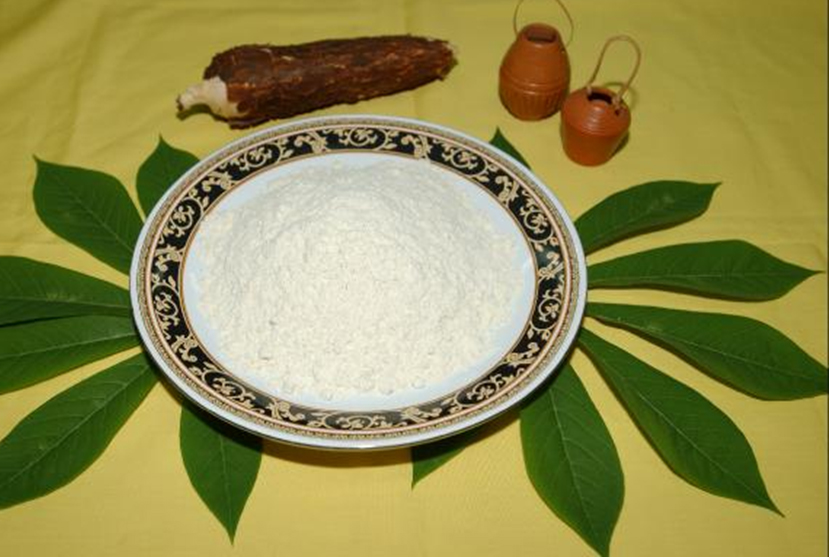 Tepung Tapioka